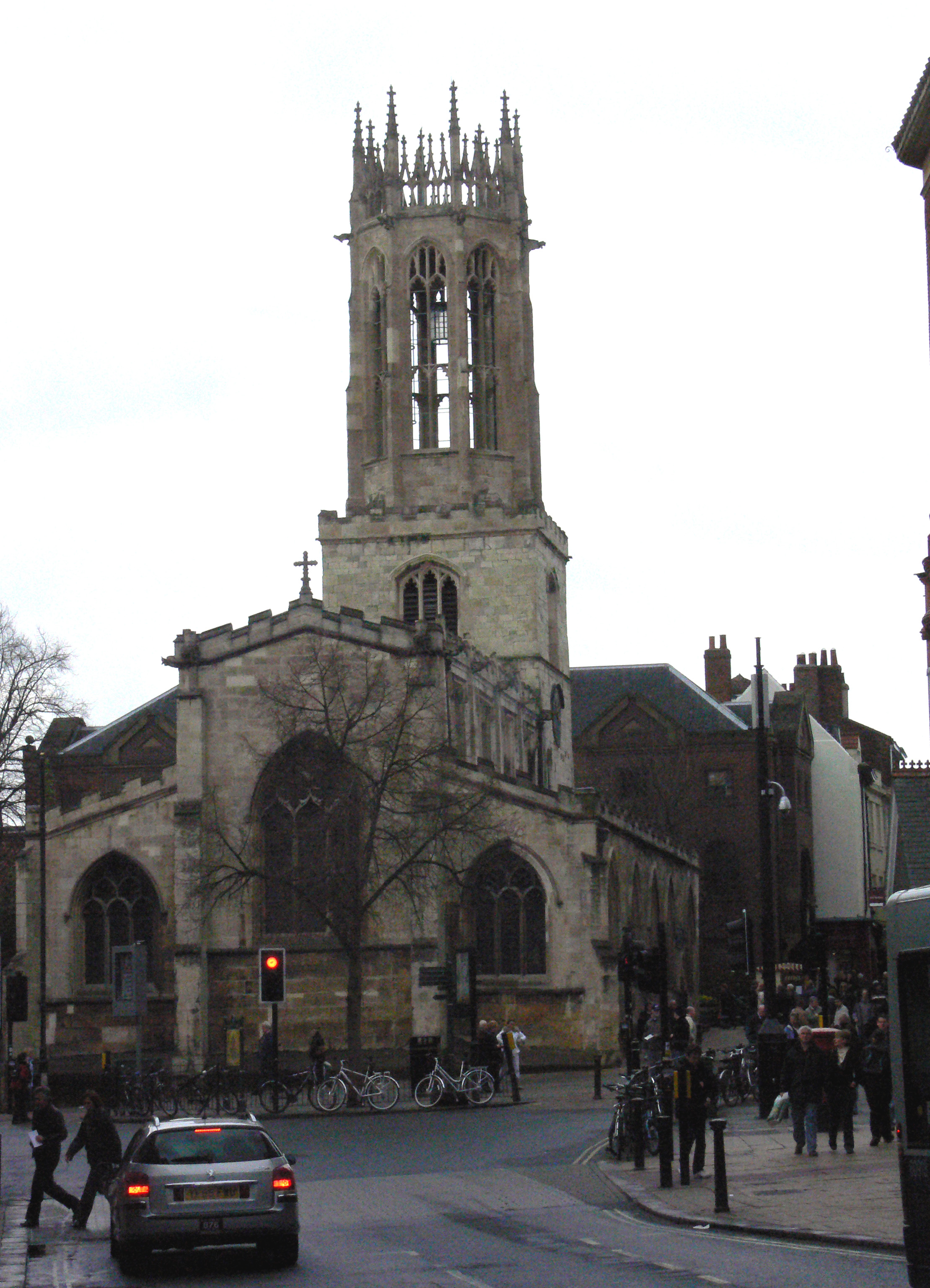 Die Kirche All Saints Pavement in York